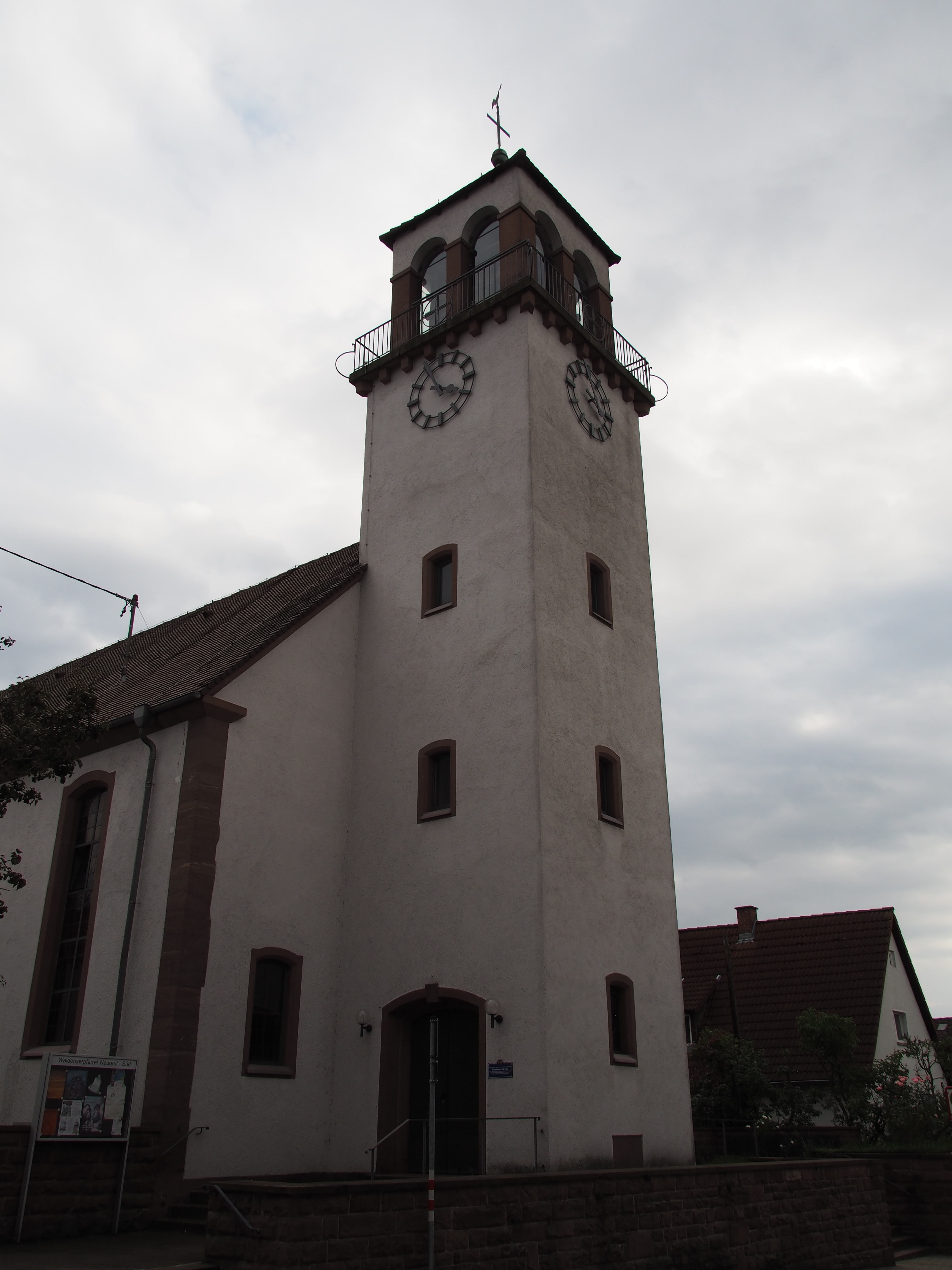 Die Kirche befindet sich in der Neureuter Hauptstrasse 84 in Neureut.